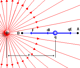 Carga de prueba que se mueve en un campo eléctrico